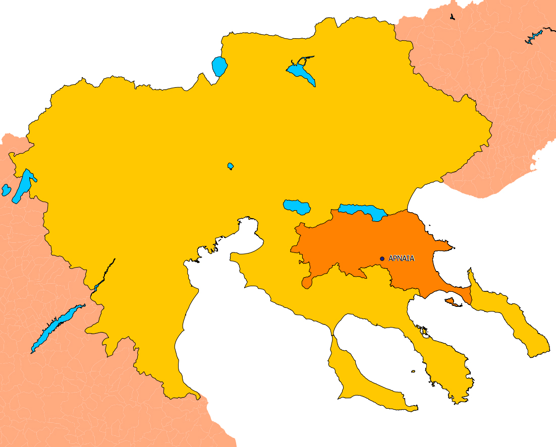 Диоцез на Йерисовската, Светогорска и Ардамерска епархия.